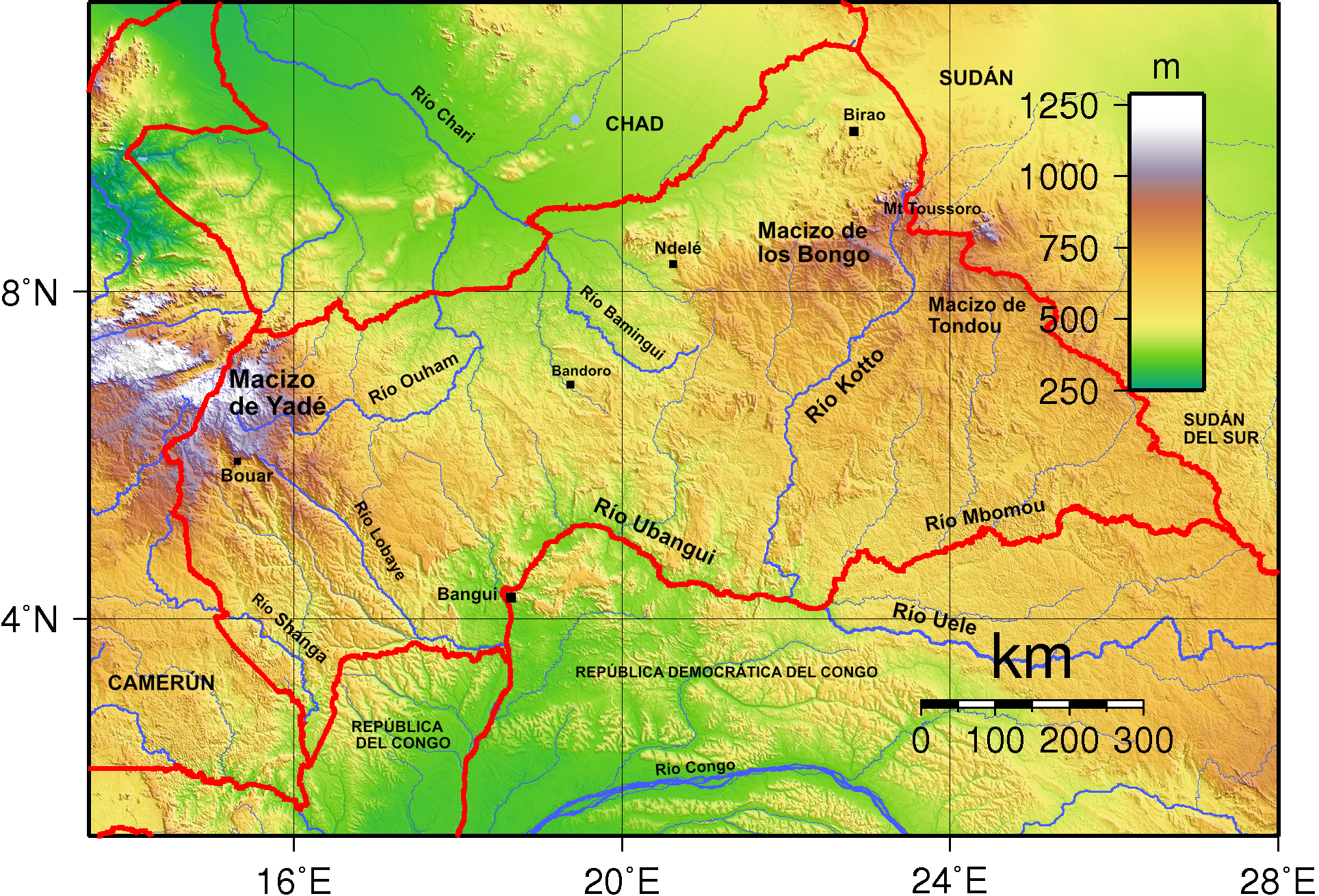 Topografía con nombres a partir del mapa topográfico de la wikipedia